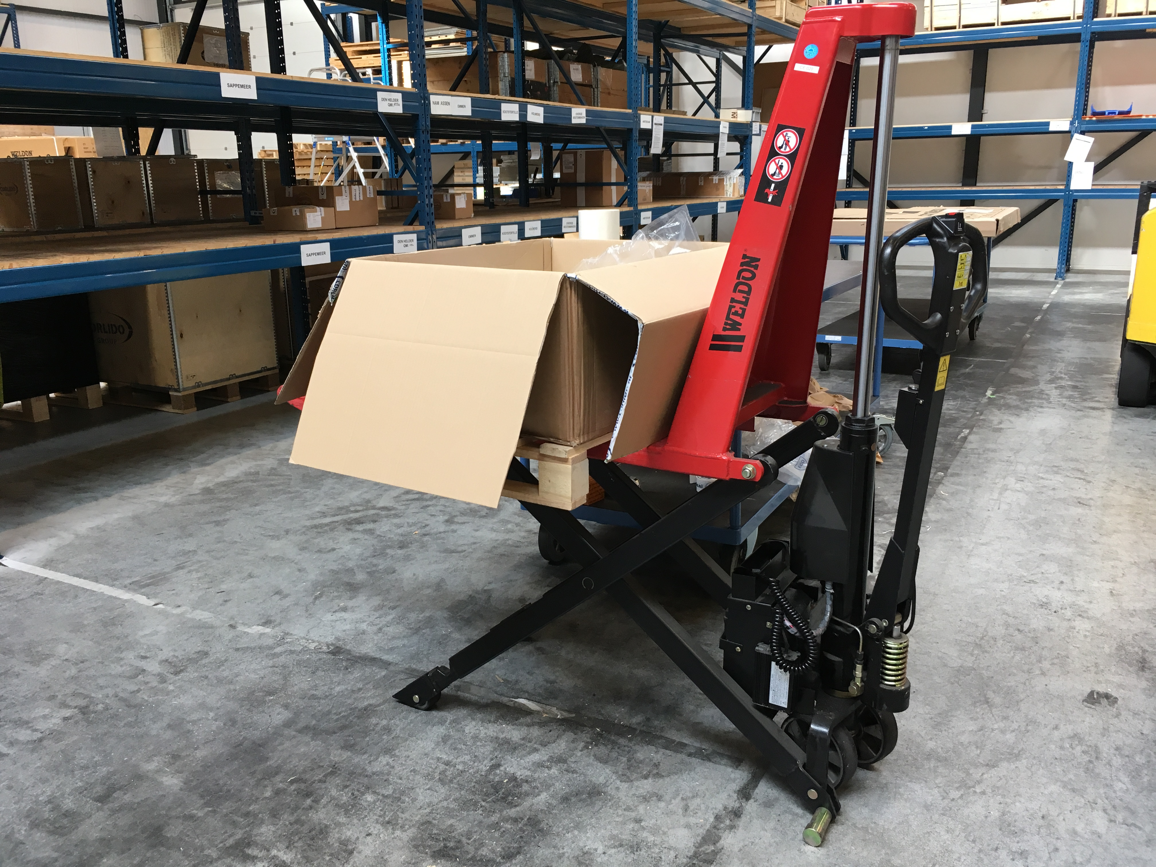 Een elektrische schaar palletwagen (schaarhoogheffer) van het merk Weldon in gebruik.